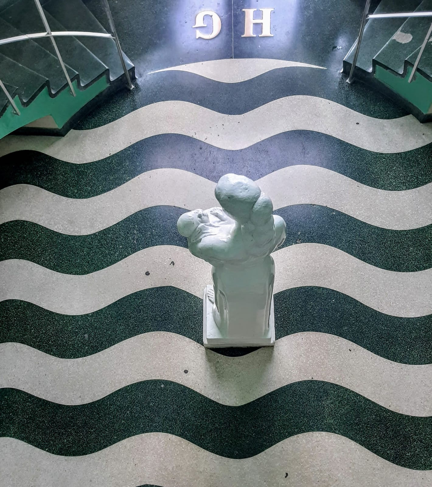 Escultura, vista posterior de maternidad y entrada del Hospital Materno Infantíl de Diez de Octubre, Hijas de Galicia.